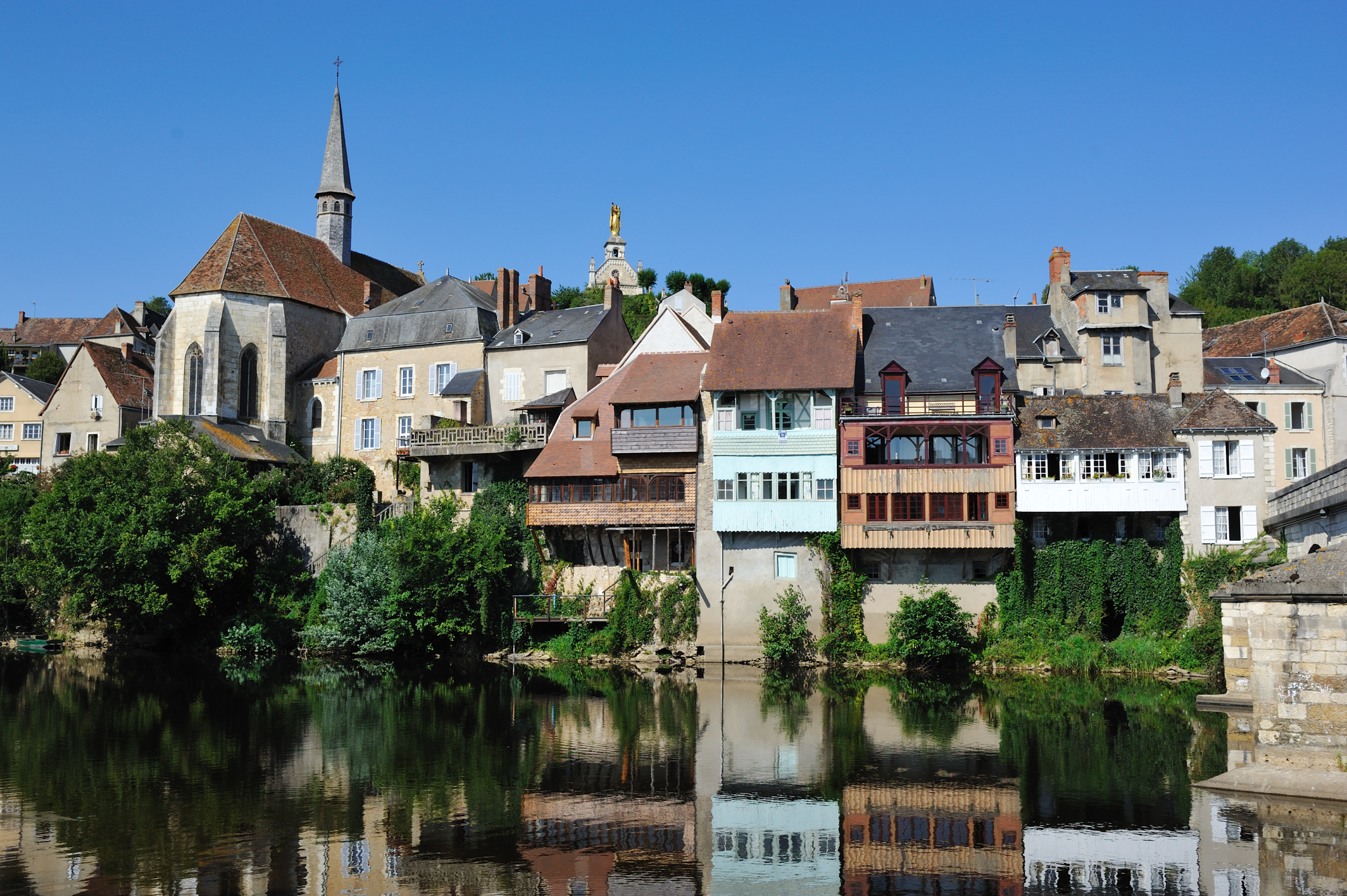 Bords de Creuse à Argenton-sur-Creuse, Indre, France